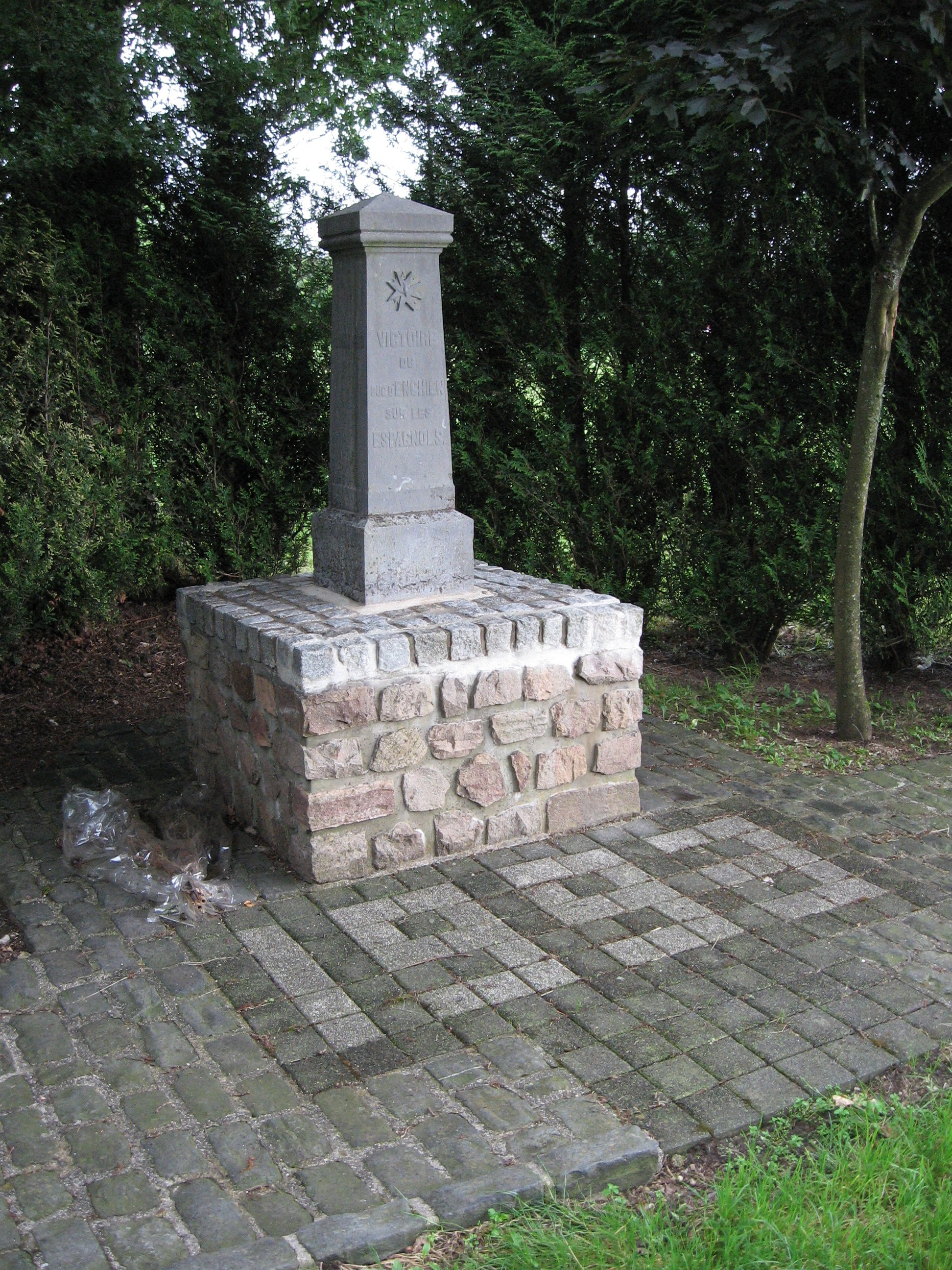 Stèle commémorant la bataille de Rocroi.